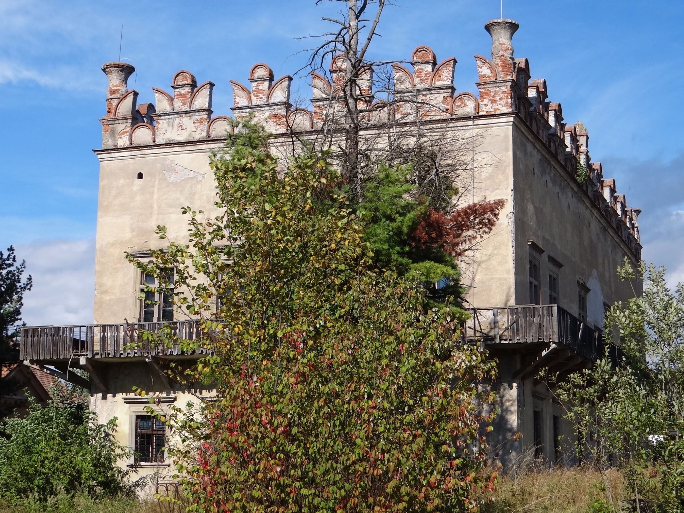 Thurzovský kaštieľ v Betlanovciach